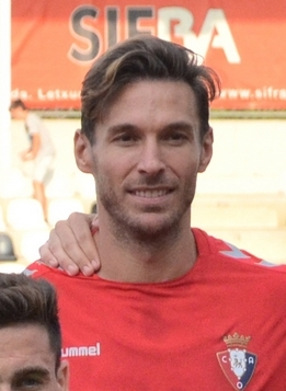 CSC_0149